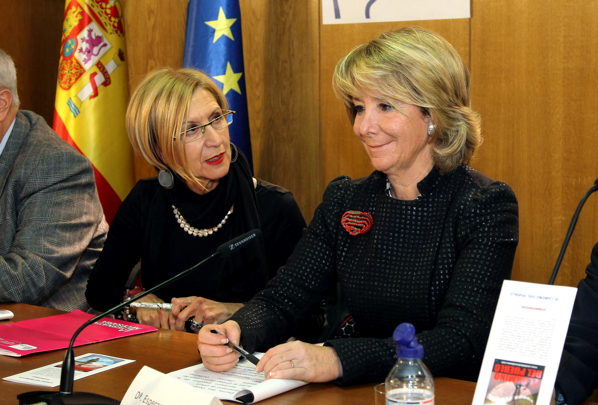 Rosa Díez y Esperanza Aguirre en un homenaje a Oswaldo Payá y Harold Cepero